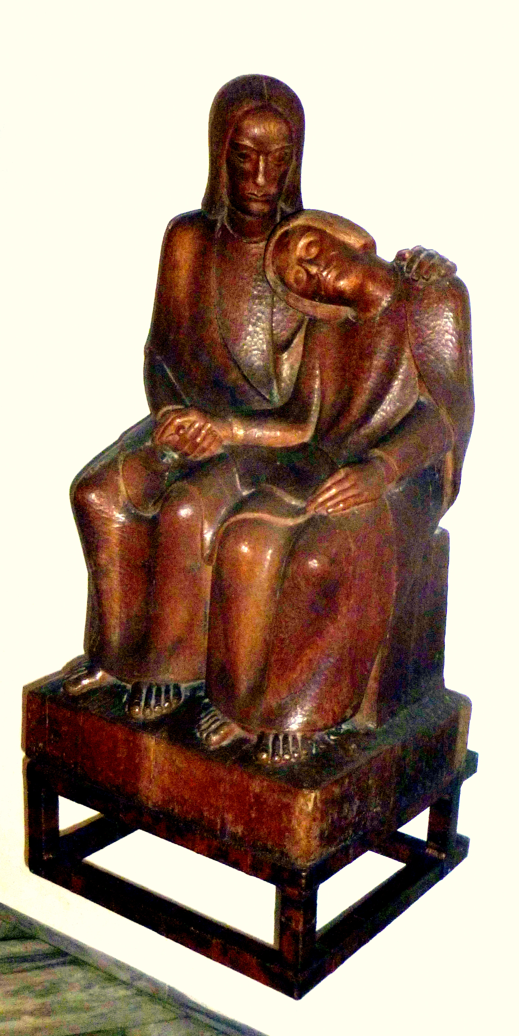 Skulptur Christus und Johannes von Josef Zeller in St. Gregorius, Aachen-Burtscheid